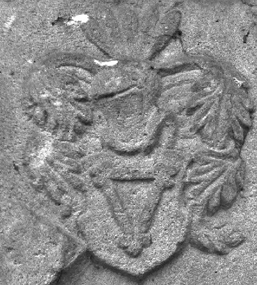 Herb Ullesdorf, sztuczna ruina w Bożkowie